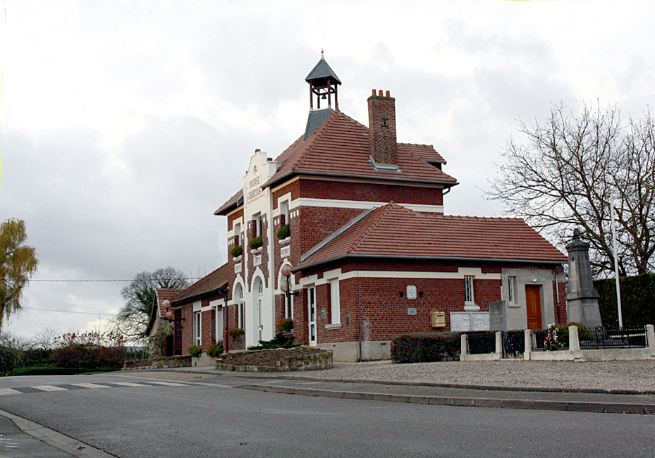 Mairie